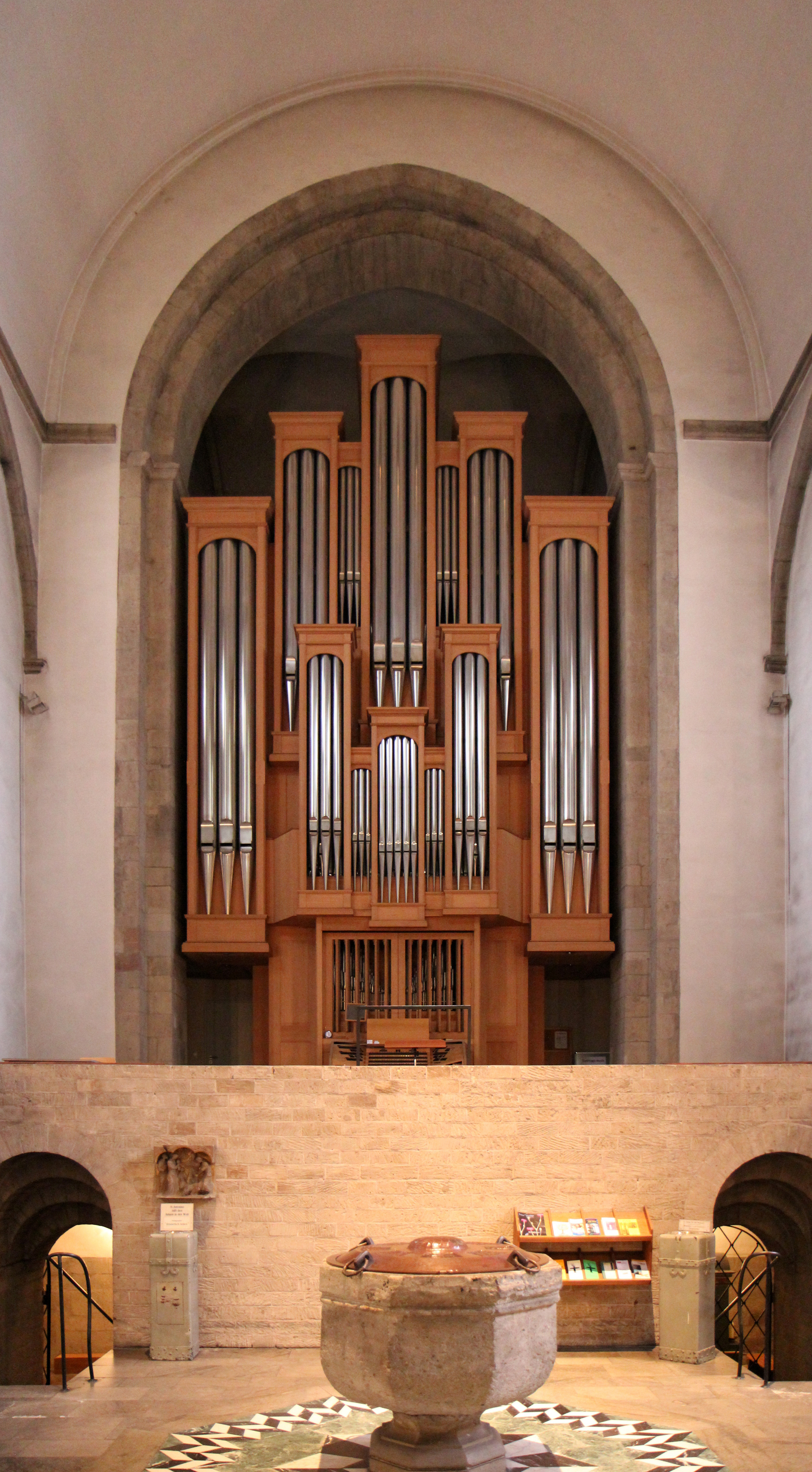 Sankt Aposteln Köln, Hauptorgel im Westwerk. Fischer + Krämer Orgelbau